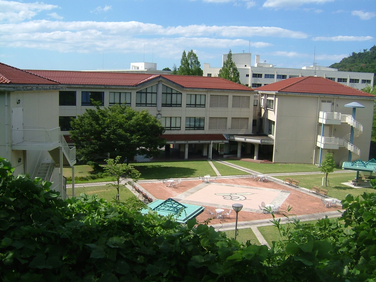 鳥取短期大学